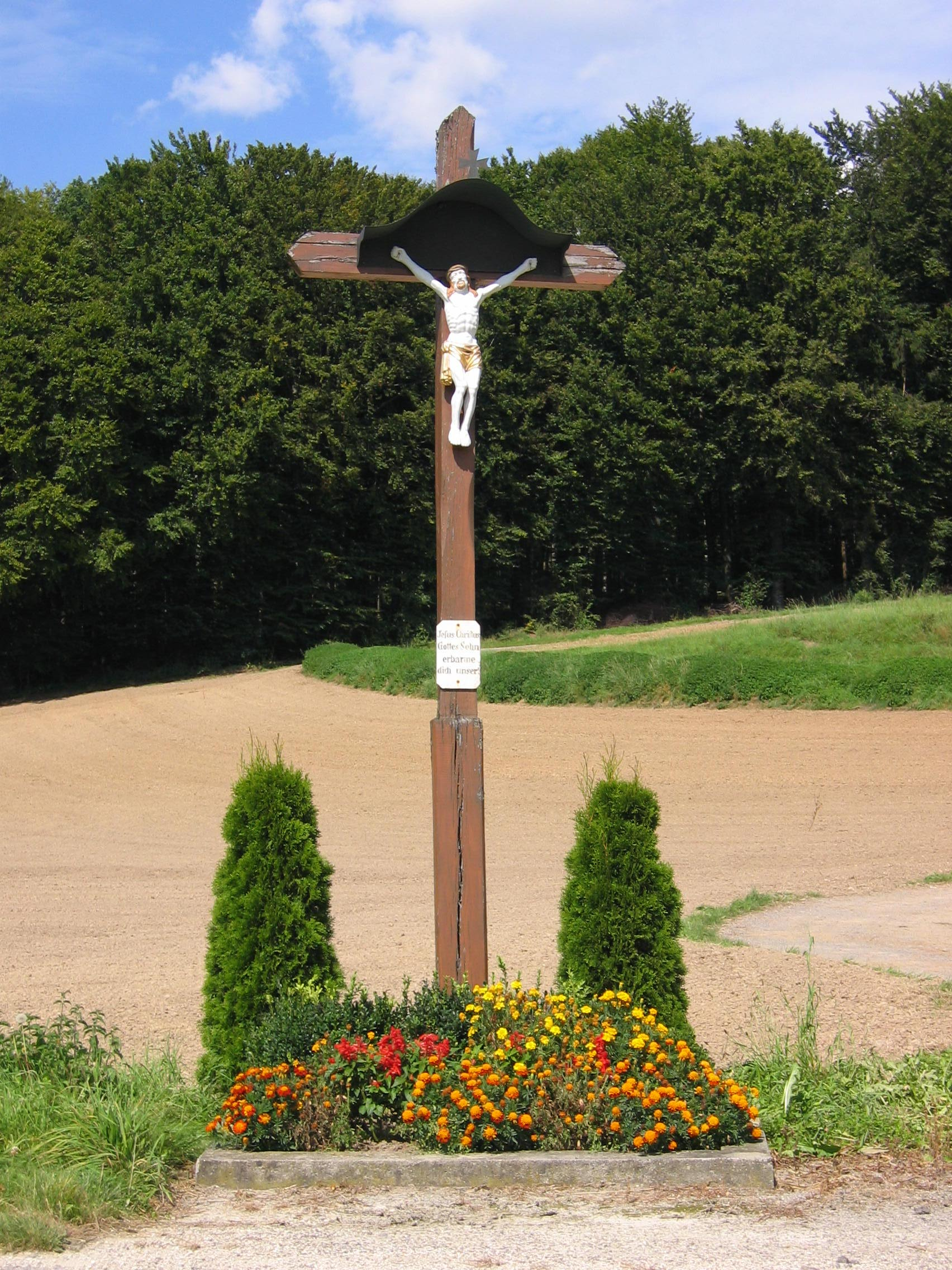 Feldkreuz an der Straße von Bittelschieß nach Göggingen